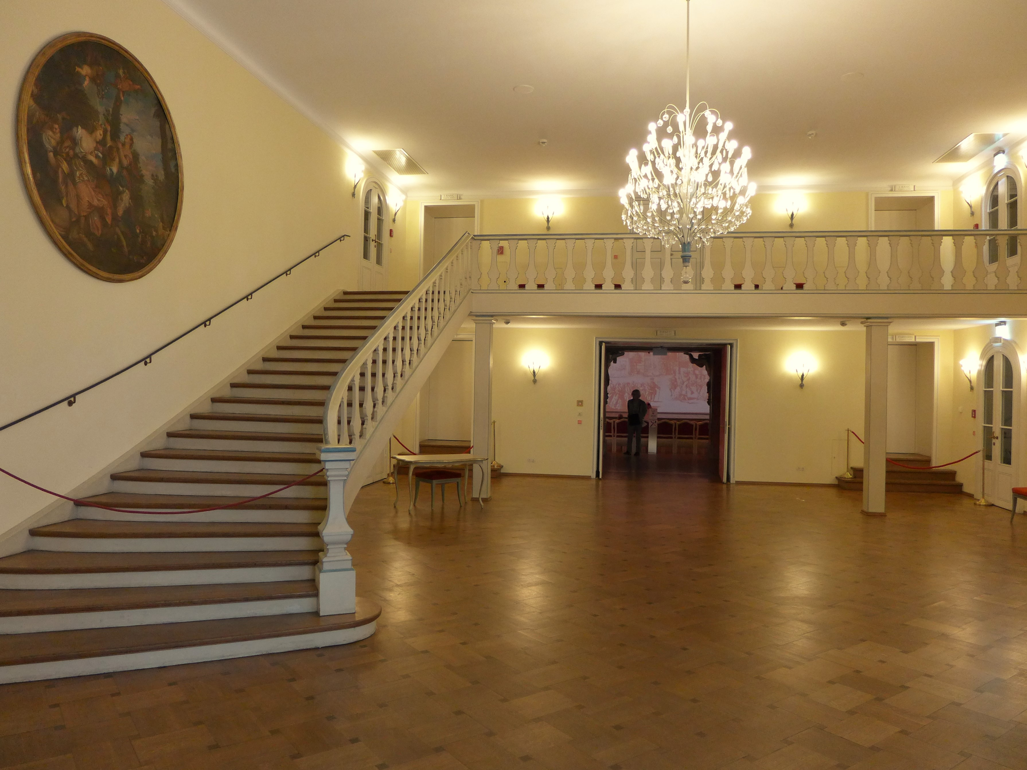 Cuvilliés-Theater, Foyer